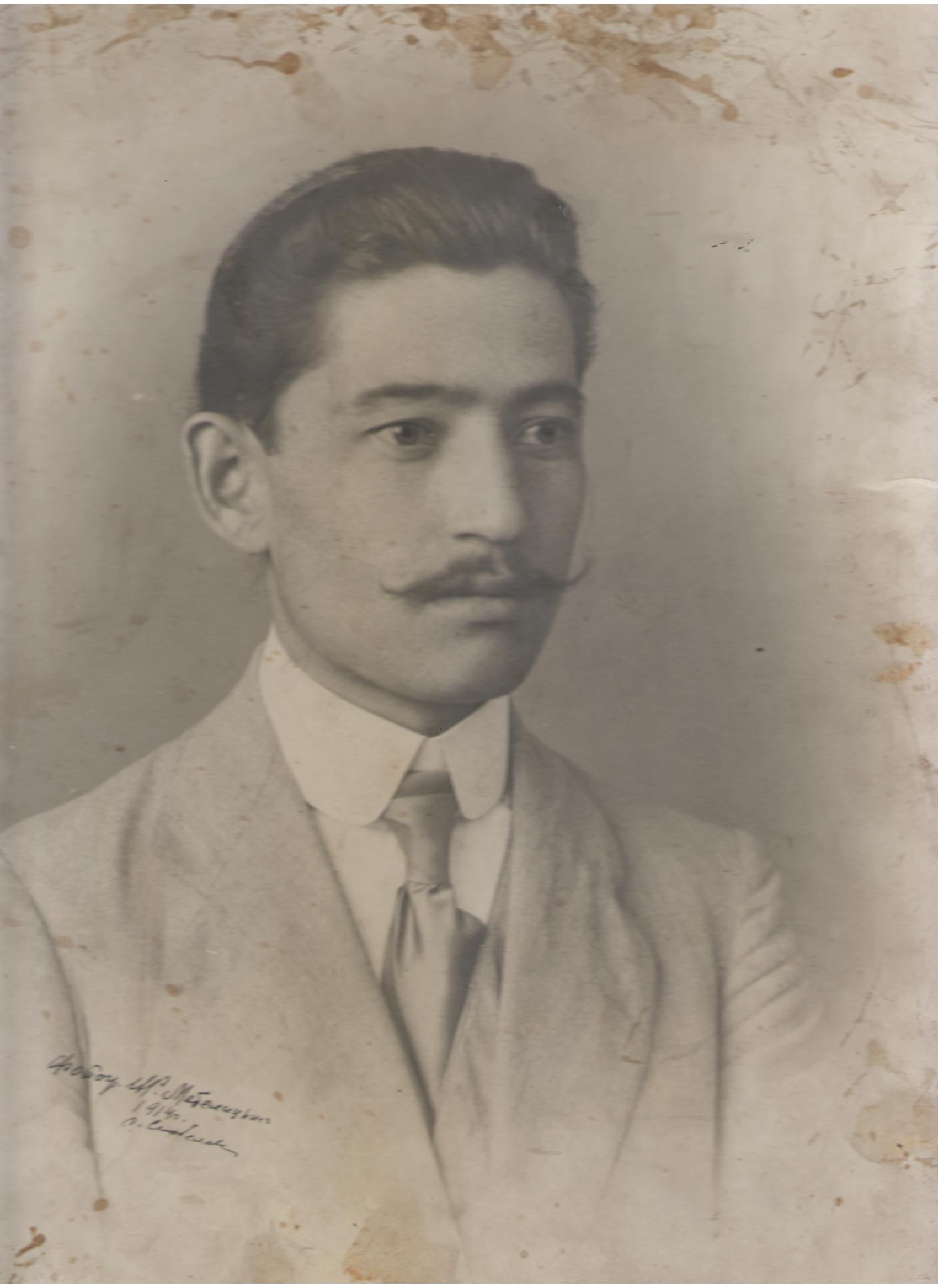 Политический и государственный деятель Средней Азии, заместитель министра внутренних дел Кокандской автономии